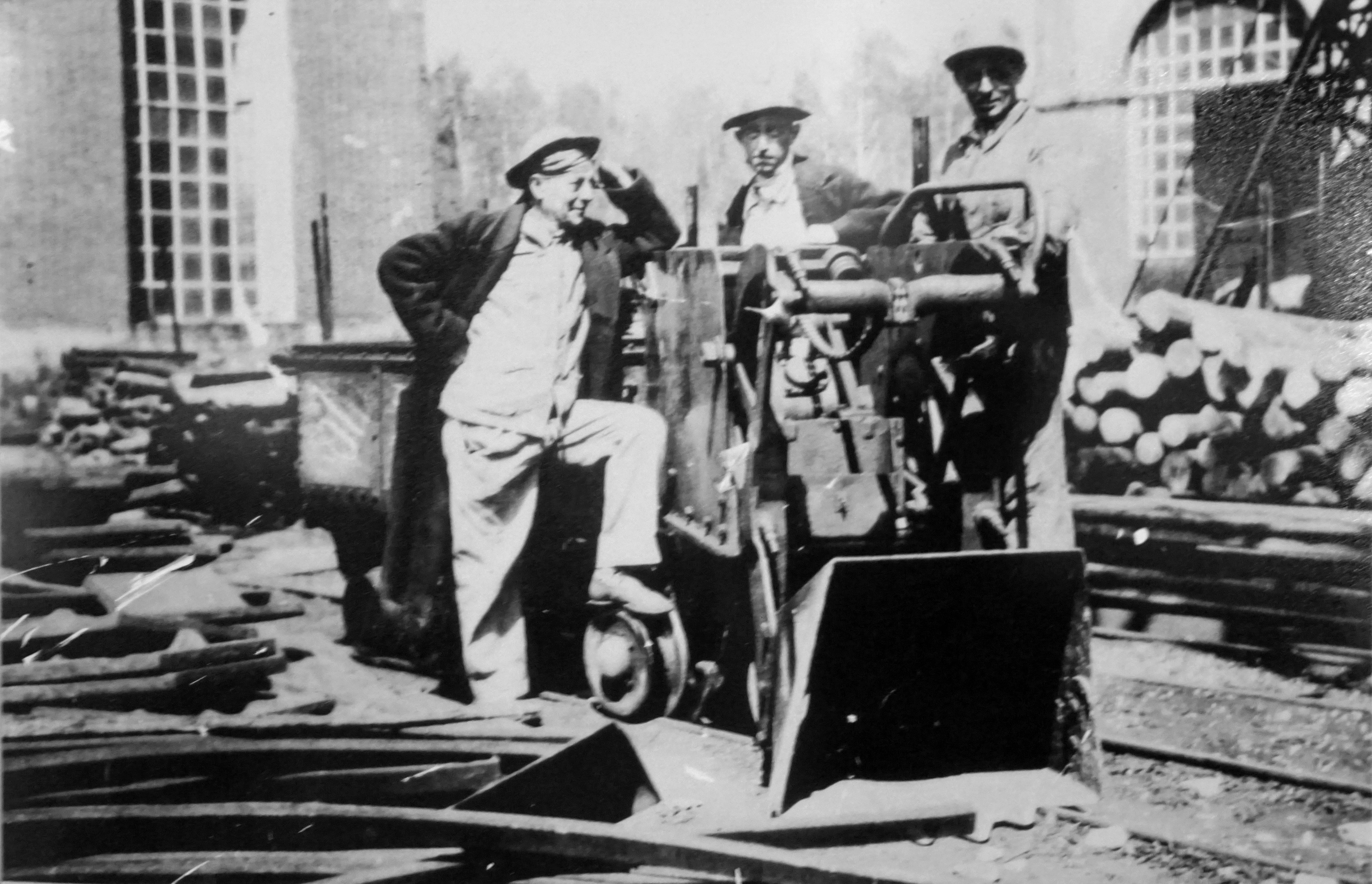 La pelle mécanique Ingersoll Eimco du puits Arthur-de-Buyer.